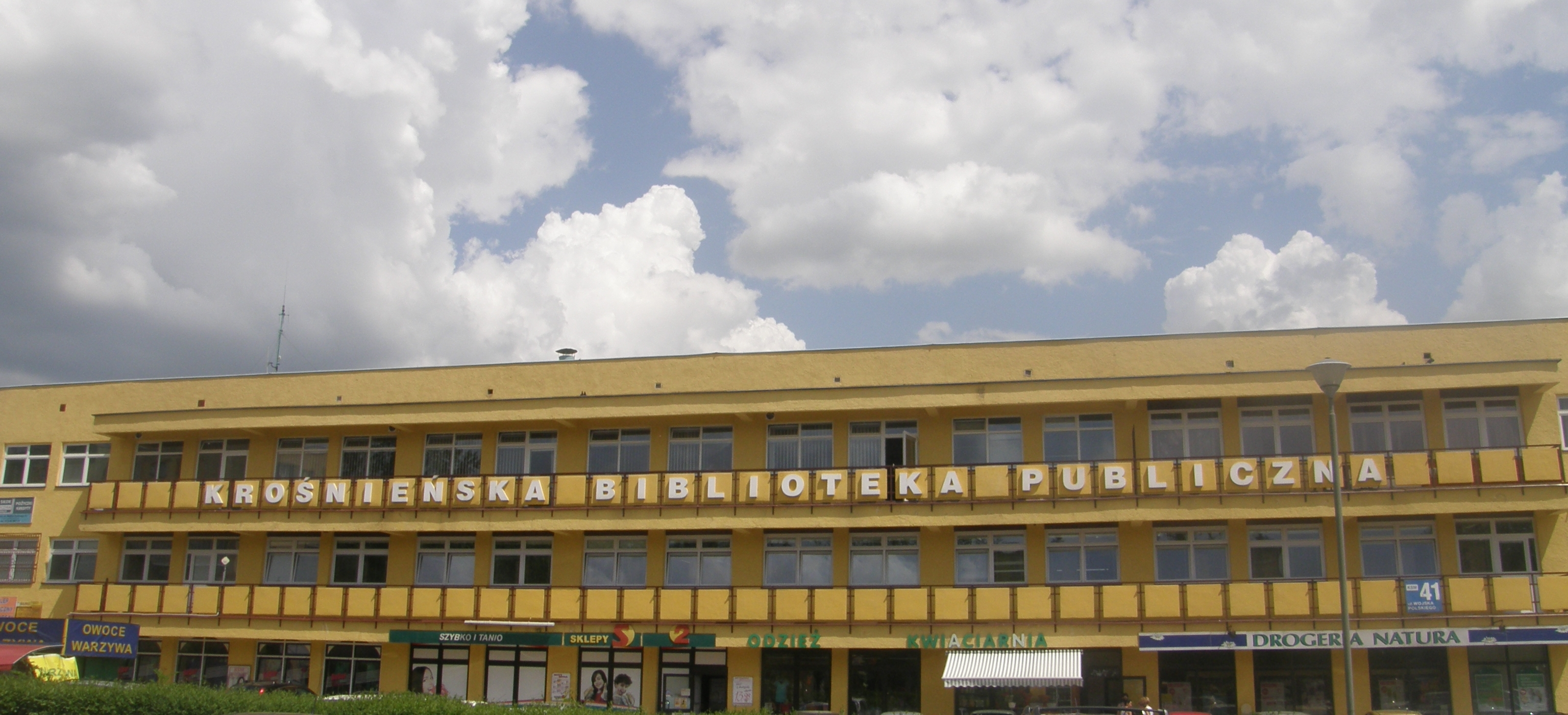 Budynek Biblioteki Głównej (Krosno, ul. Wojska Polskiego 41)